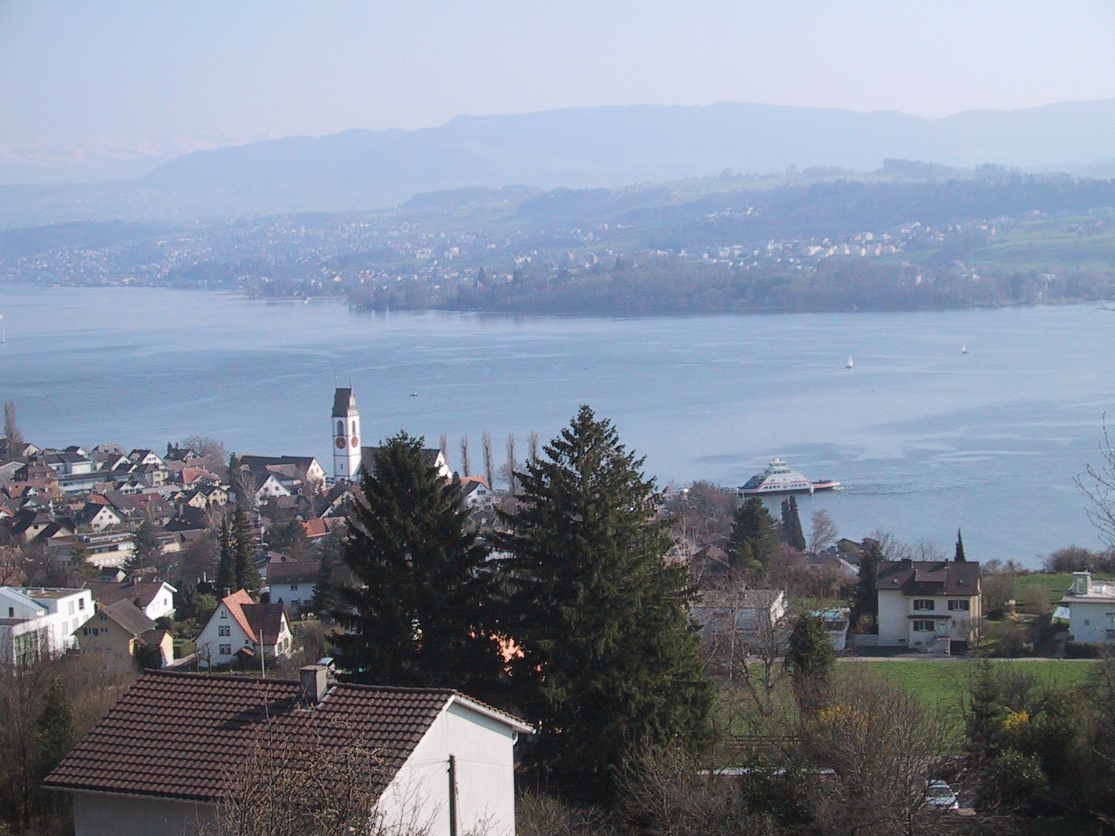 Aufnahme von Meilen, Kanton Zürich